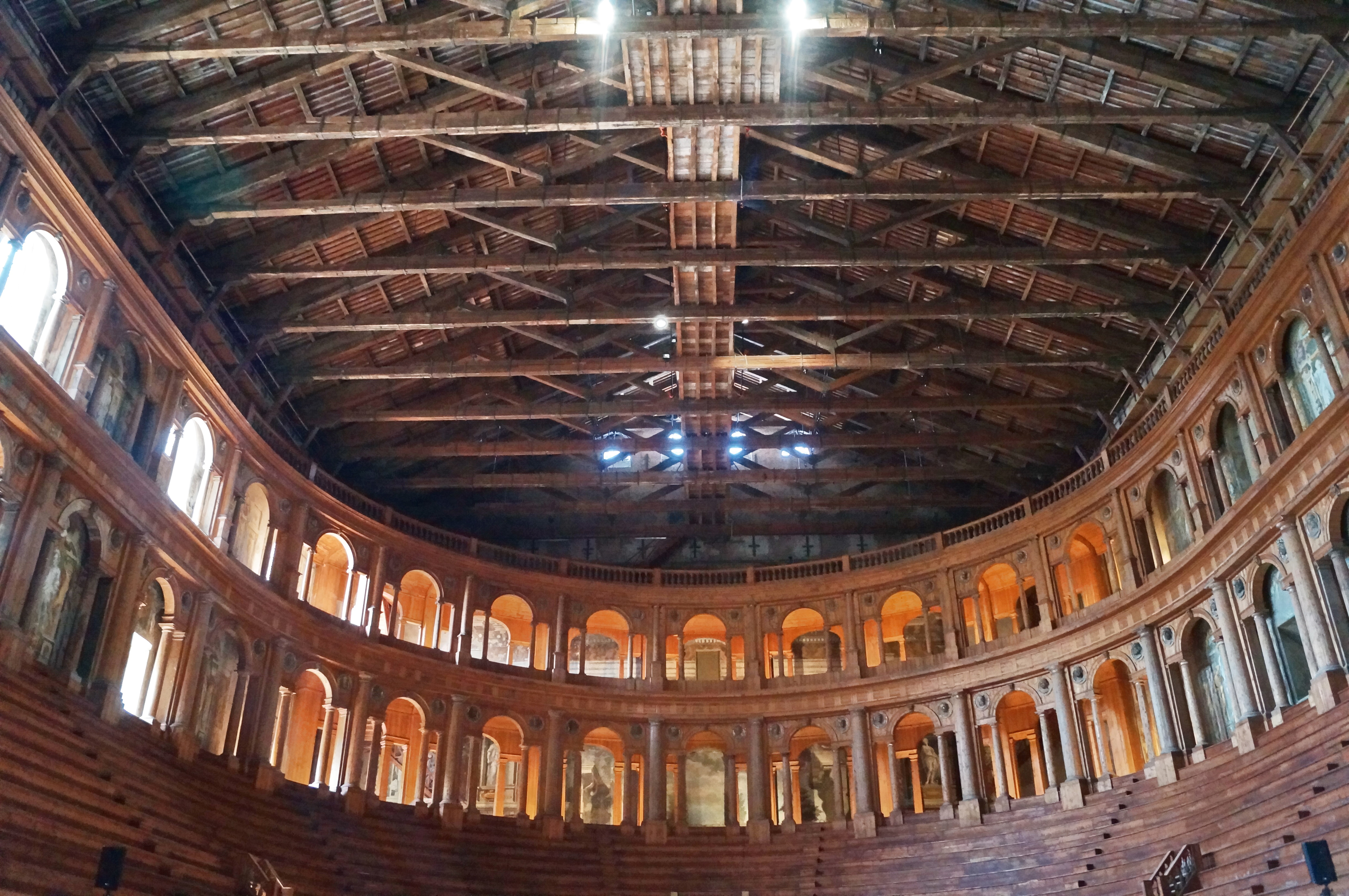 Teatro Farnese This is a photo of a monument which is part of cultural heritage of Italy.